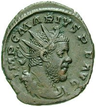 Portret van Gallo-Romeinse keizer Marius op een antoninianus (3.2g) uit 269 geslagen in Keulen